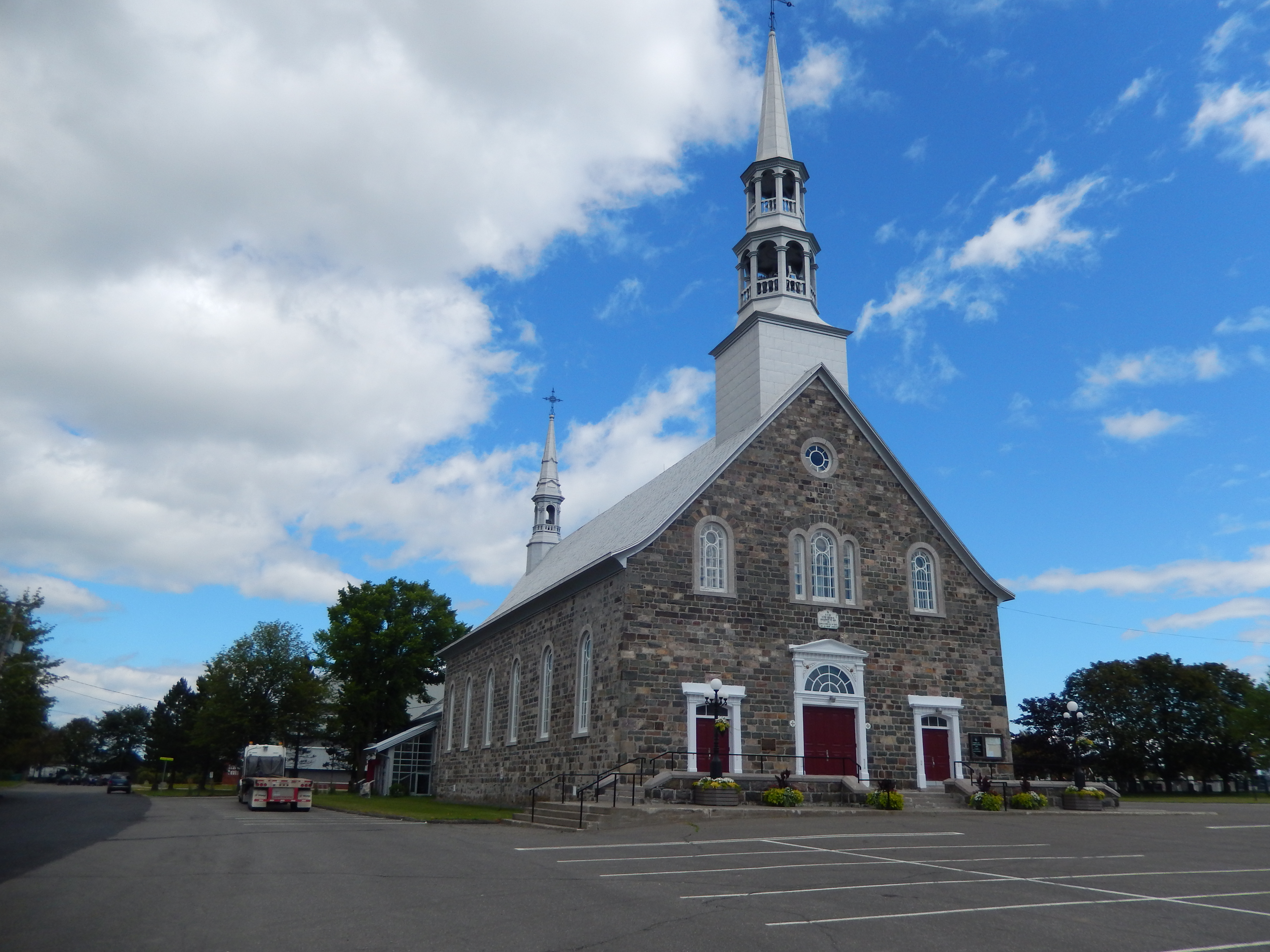 Église Saint-Georges de Cacouna en août 2017.